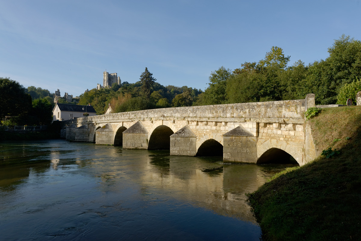 Pont sur le Loir .